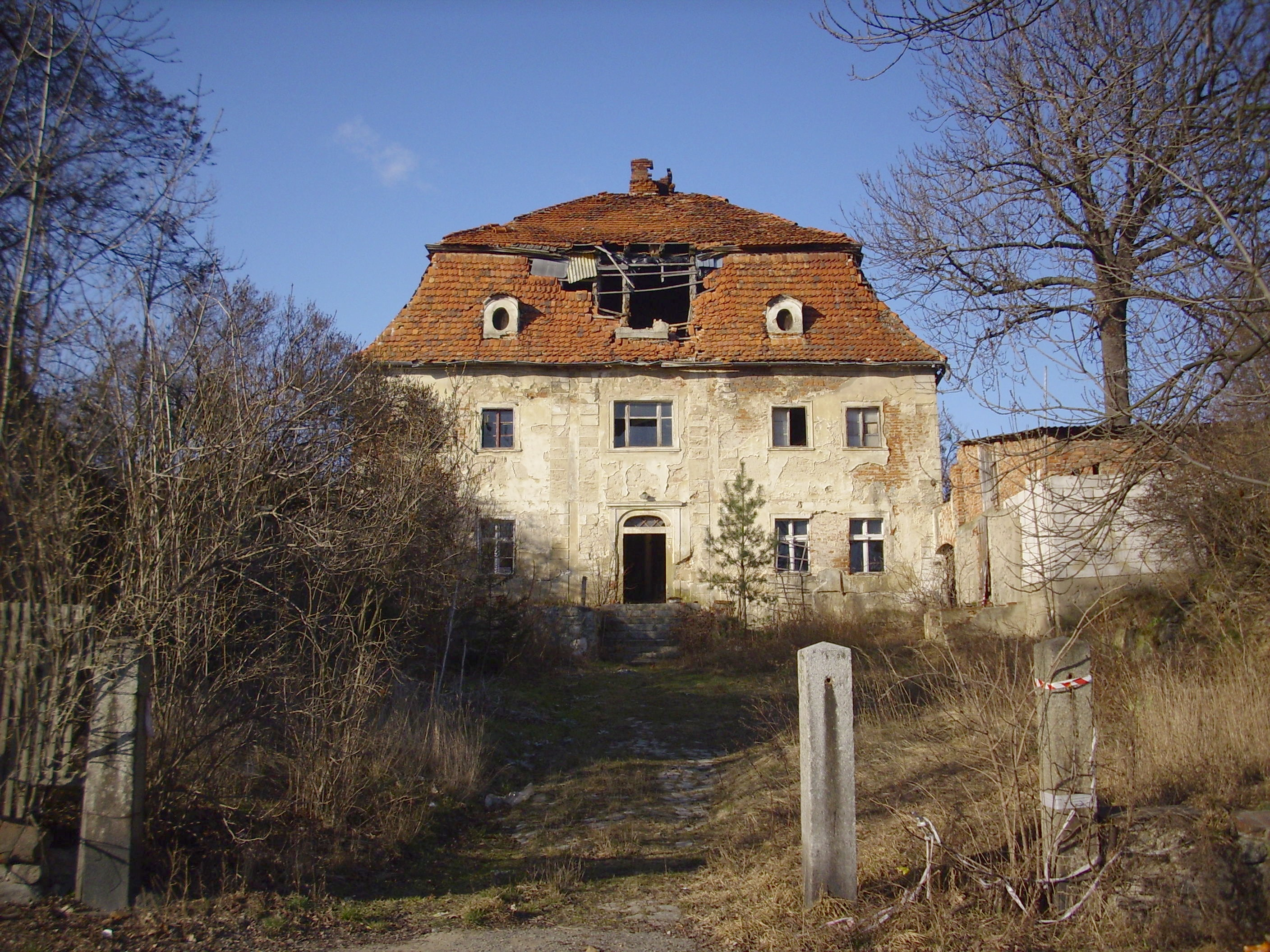 Księginice Małe, ruiny Pastorówki.